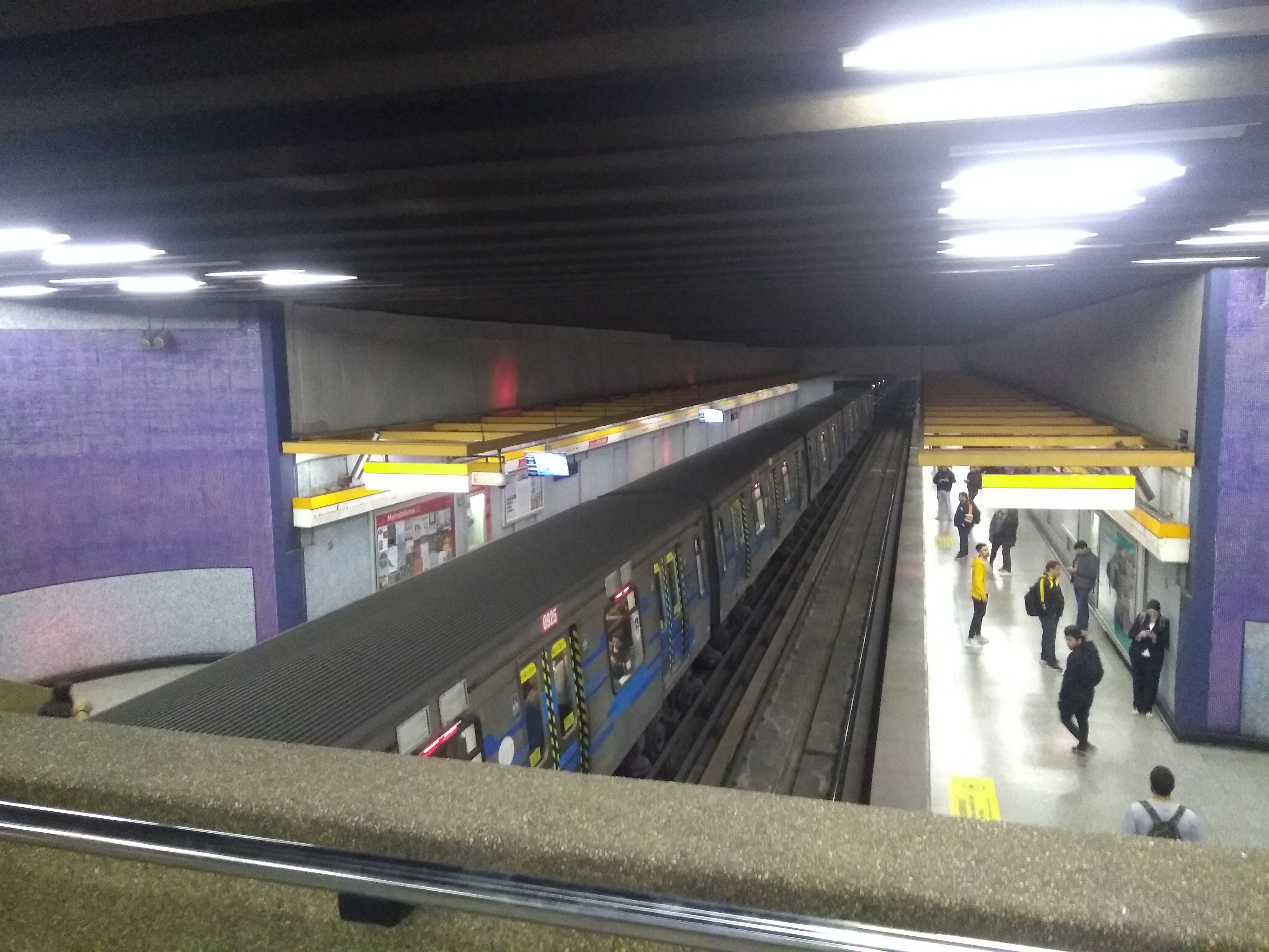 Estacion Lo Vial L2, comuna San Miguel.